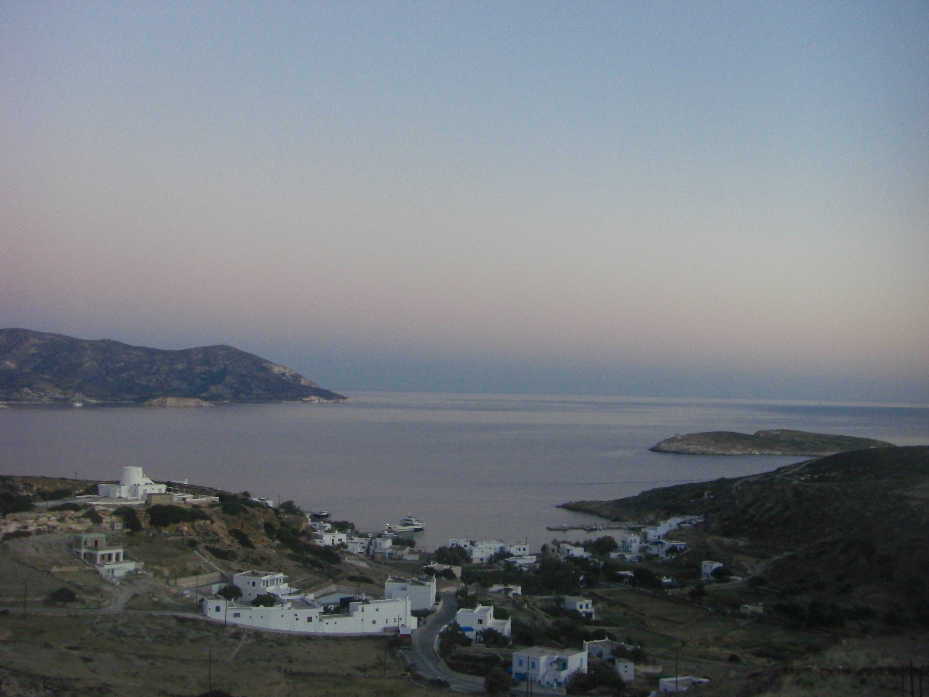 Θέα απο ψηλά